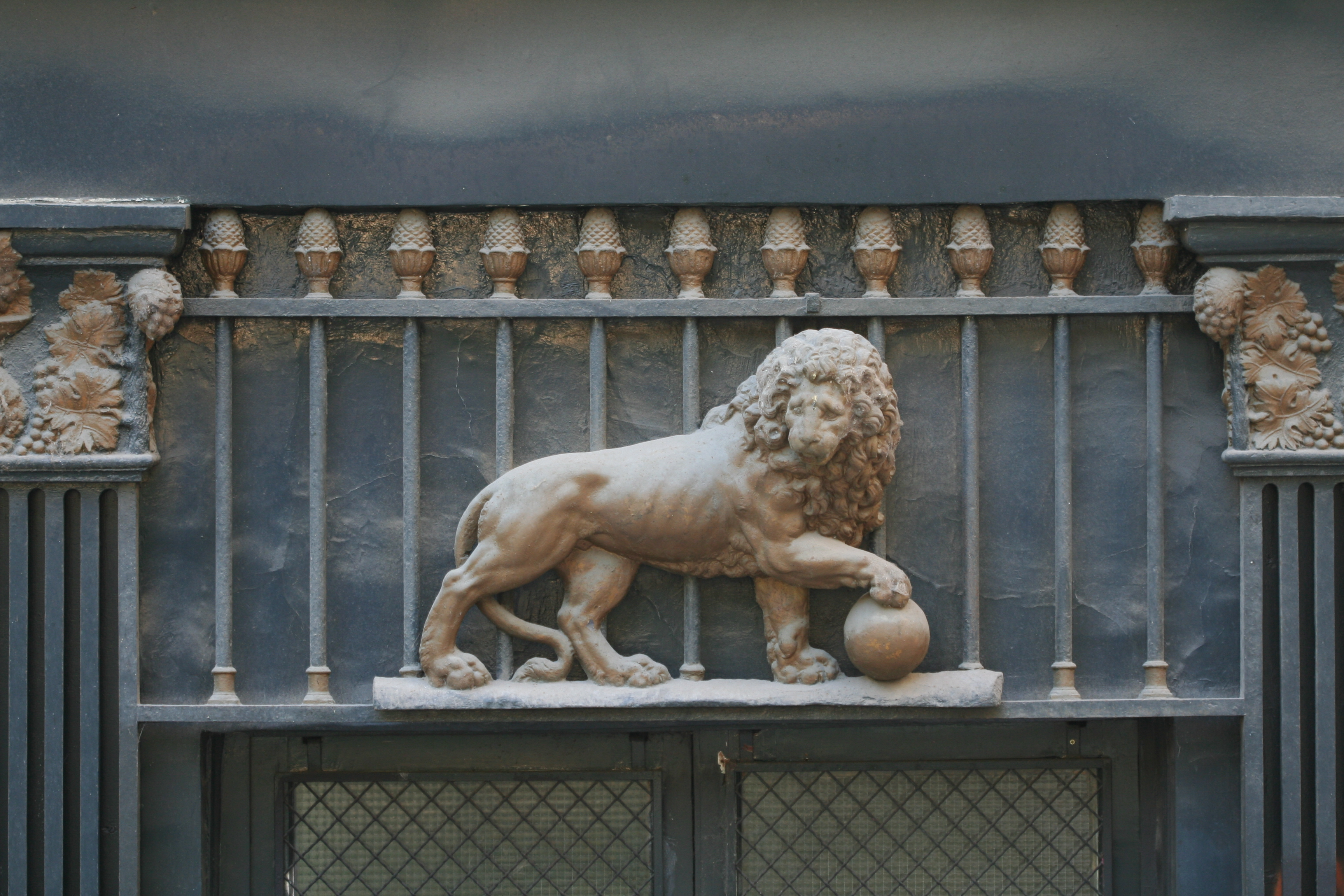 Ancien débit de boisson à l'enseigne du lion d'or, rue Jean-Poulmarch, devanture inscrite au titre des monuments historiques.